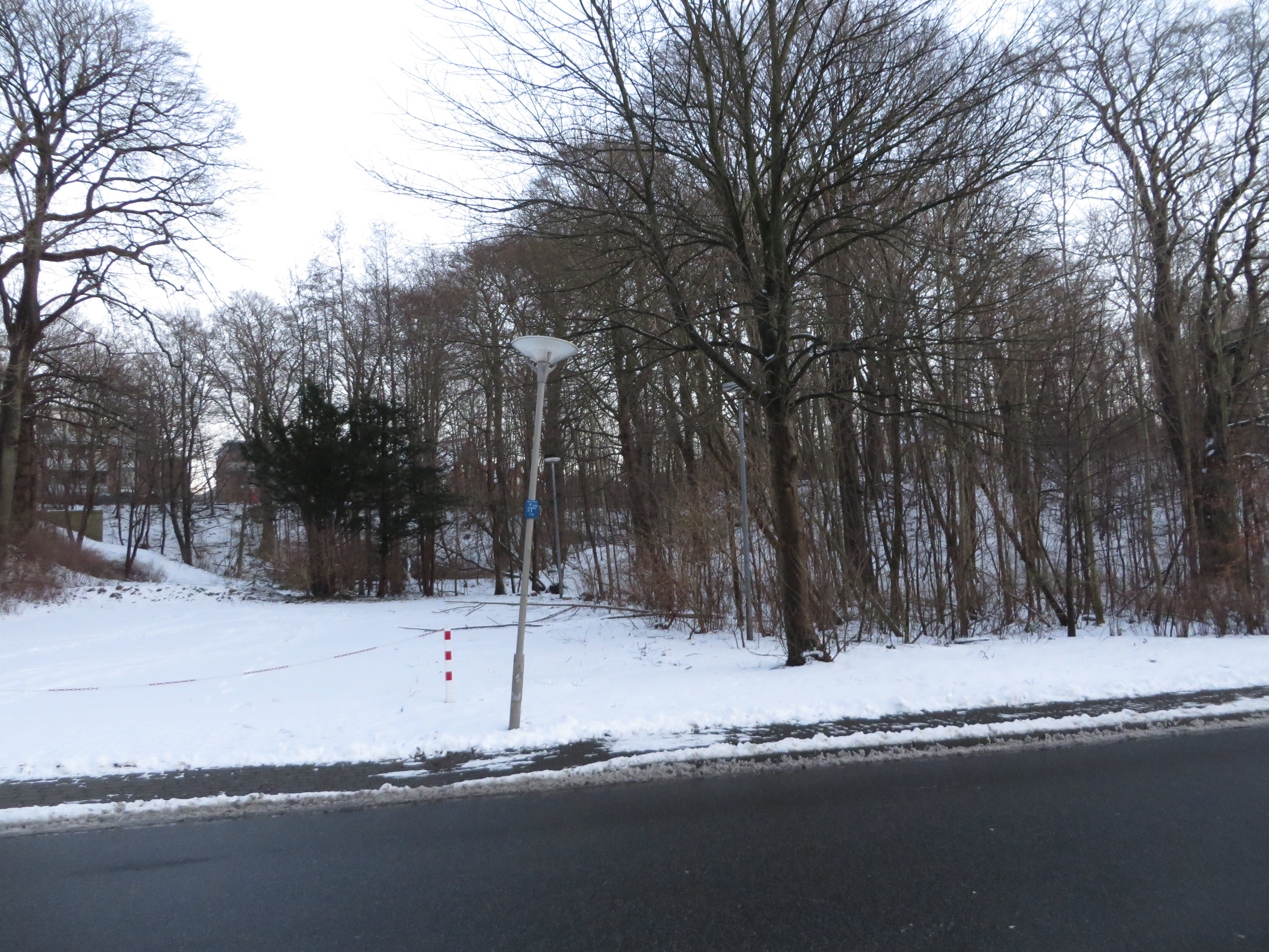 Am Sonwiker Fördewald im Winter (Mürwik Januar 2015)